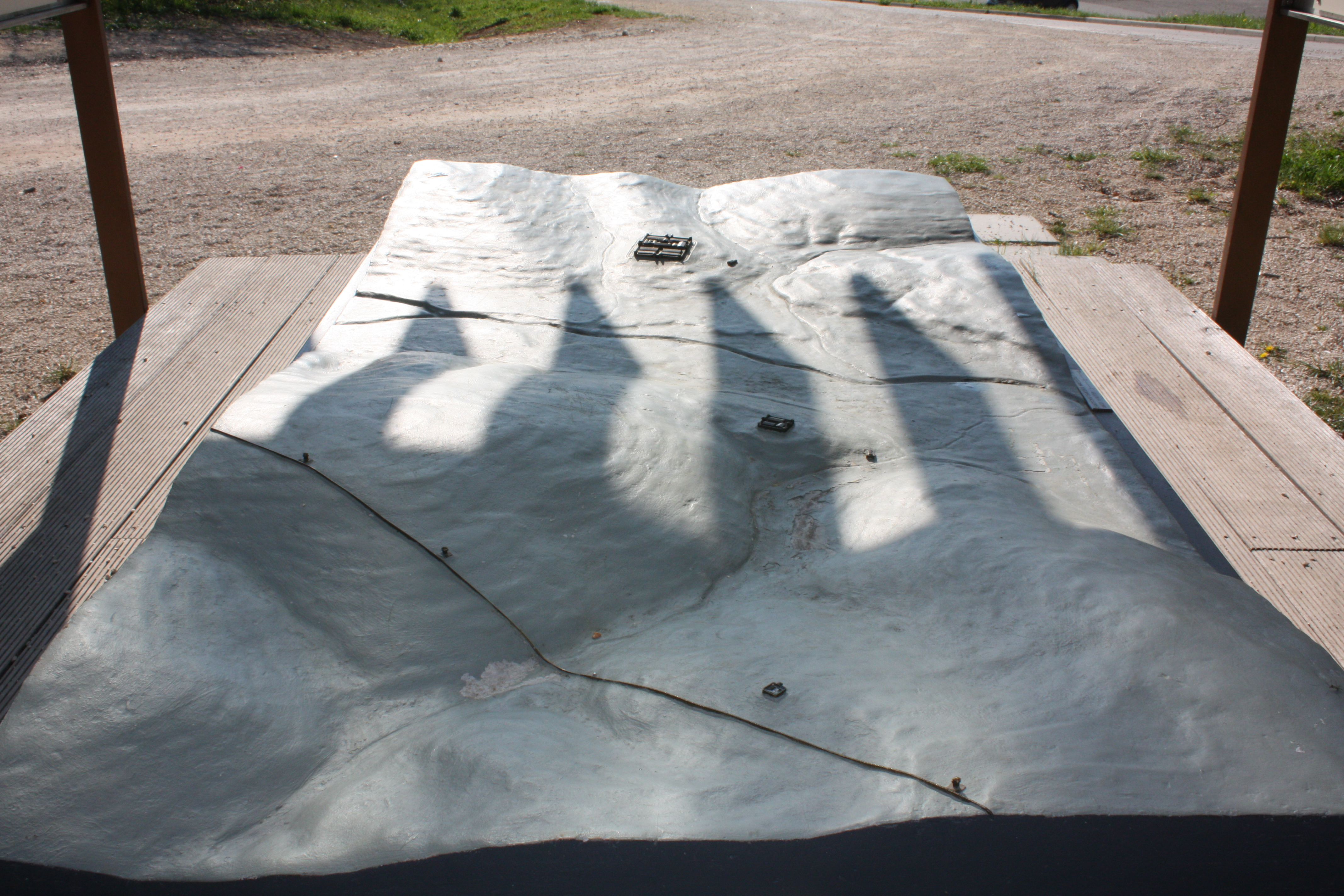 Landschaftsmodell (Maßstab 1:1500) im Rotenbachtal (Schwäbisch Gmünd). Dargestellt ist die Situation am Limes (im Vordergrund), direkt dahinter Kleinkastell Kleindeinbach. Es folgen Kleinkastell Freimühle (mit Bad) und Kastell Schirenhof mit Bad.